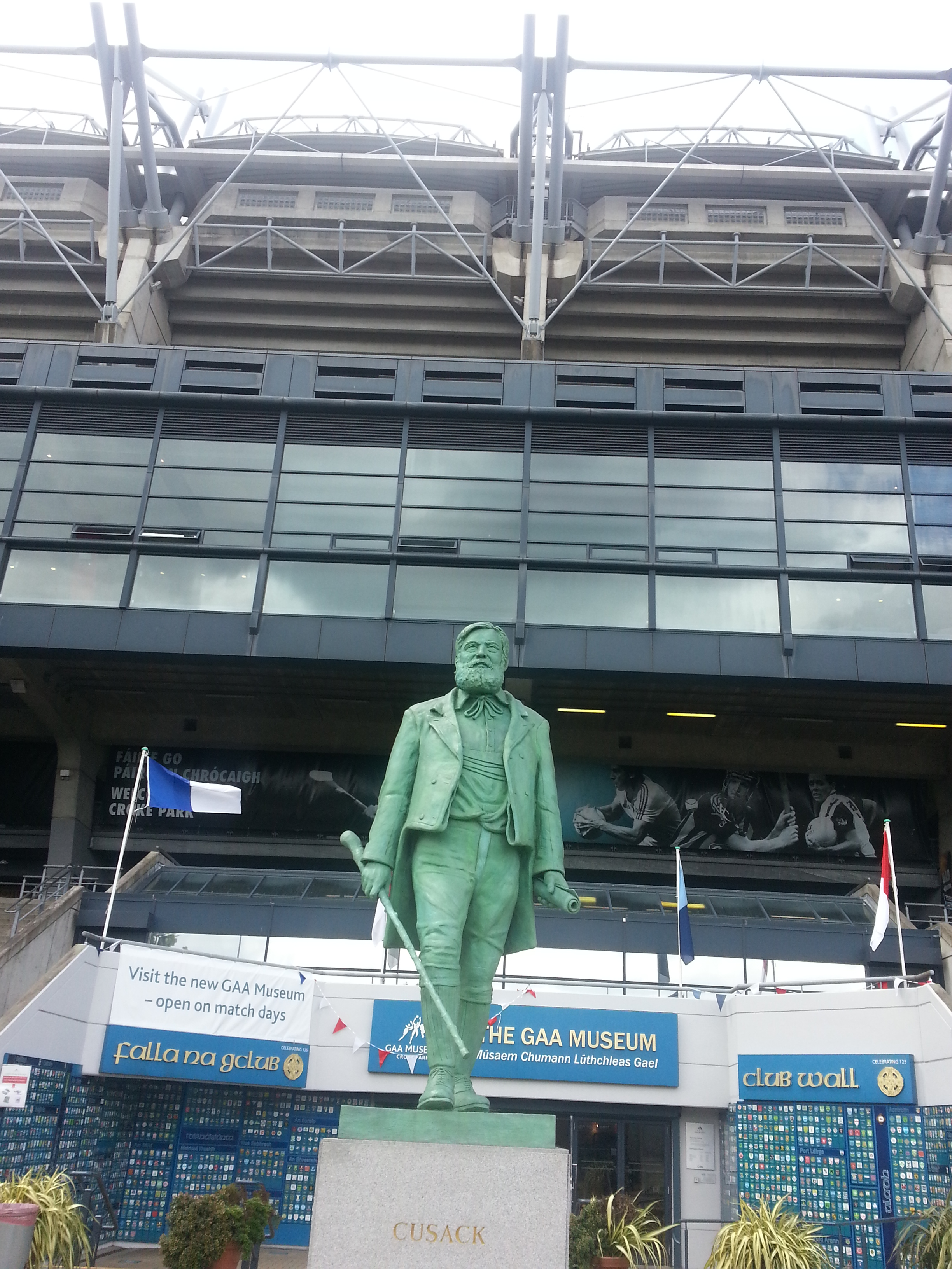 Statue de Michael Cusack (tribune Cusack à Croke Park)